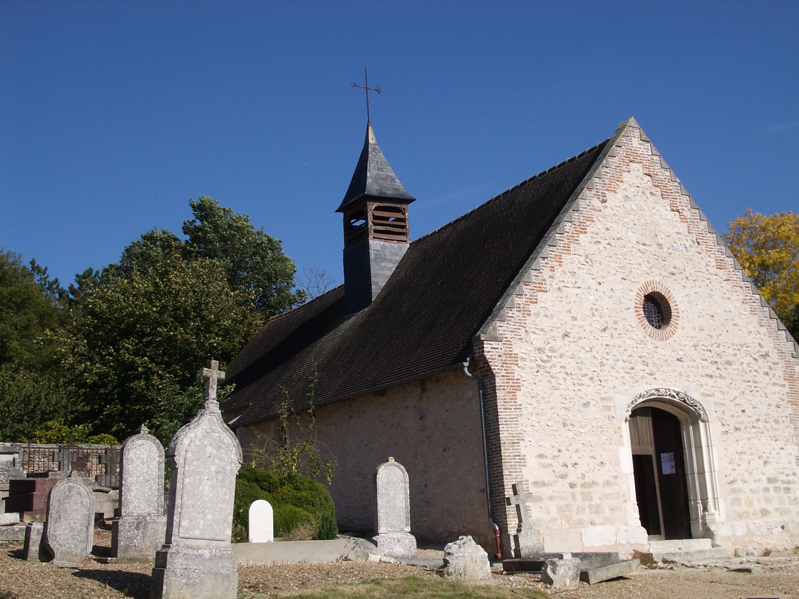 Notre-Dame de Cocherel (27120)